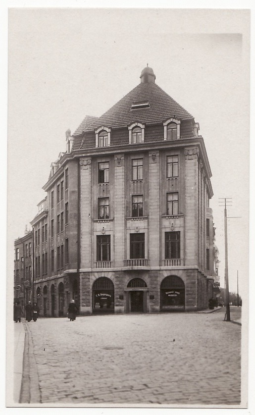 Tallinna vanalinna Suur-Karja tänav 7 hoone